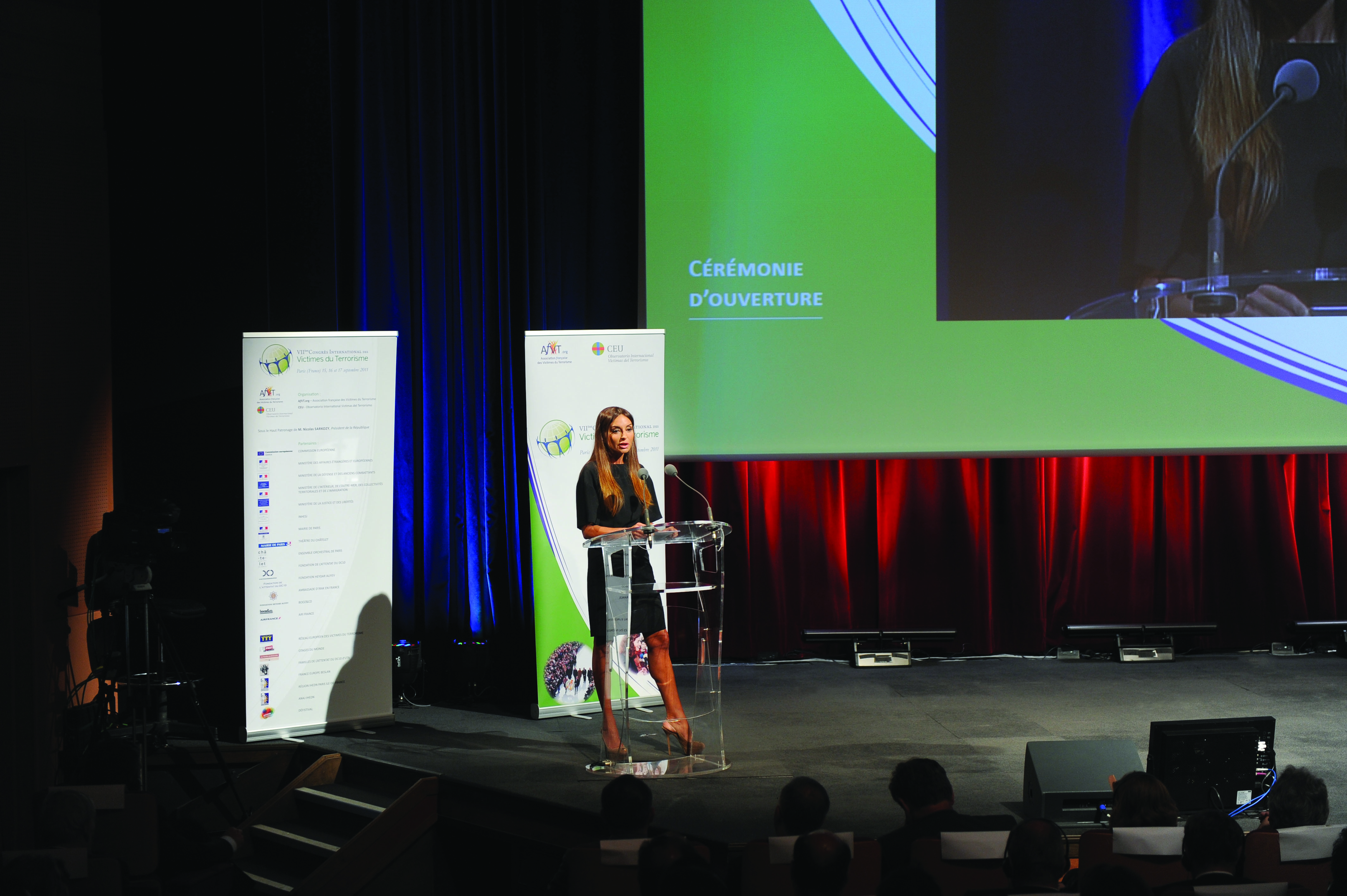 Parisdə terrorizm qurbanlarına həsr olunan 7-ci Beynəlxalq Konqresin açılışı, 15.09.2011